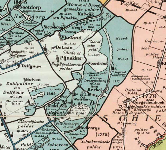 Overzicht polders rond Berkel